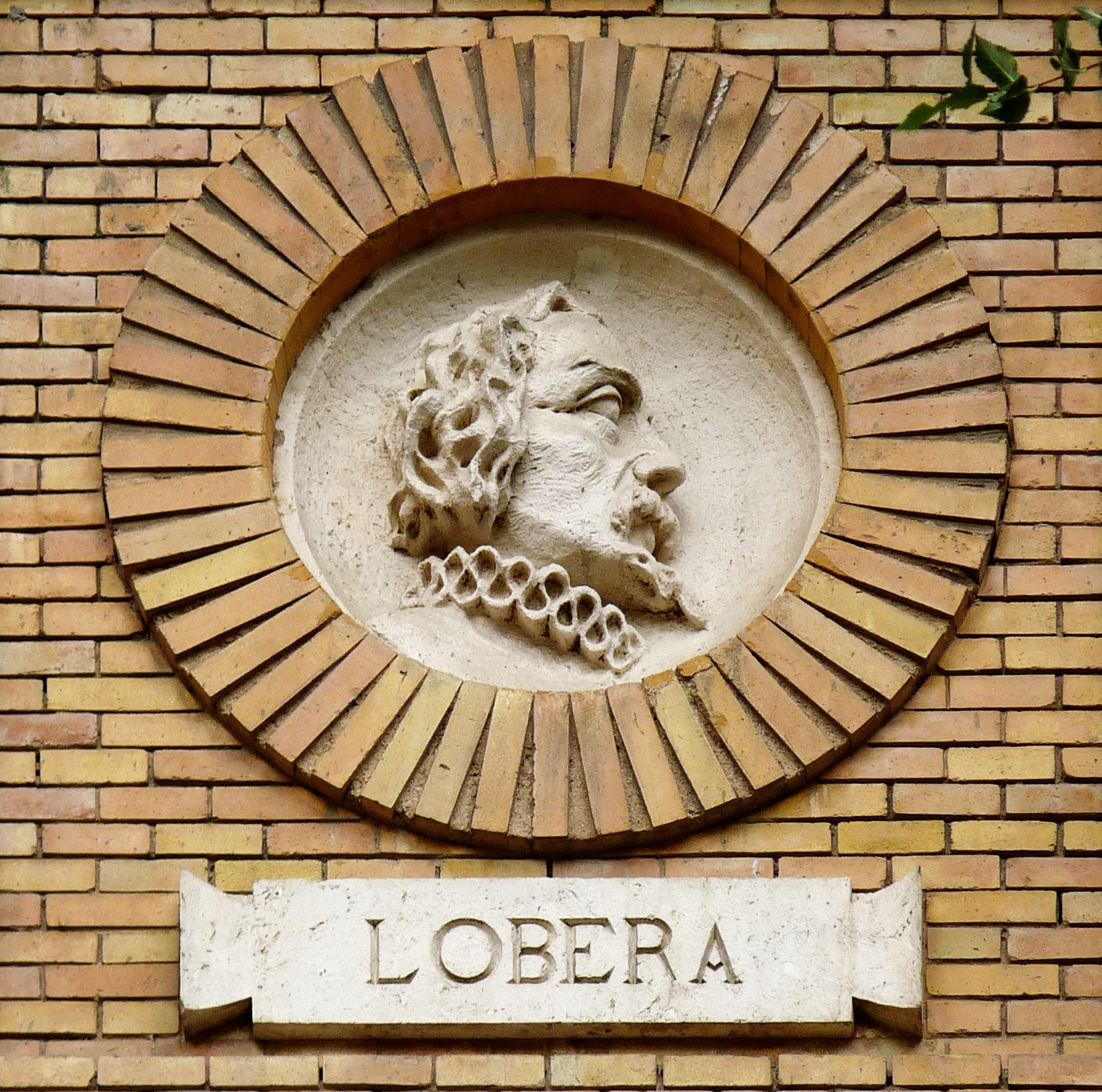 Zaragoza - Antigua Facultad de Medicina - Medallón - Luis Lobera de Ávila